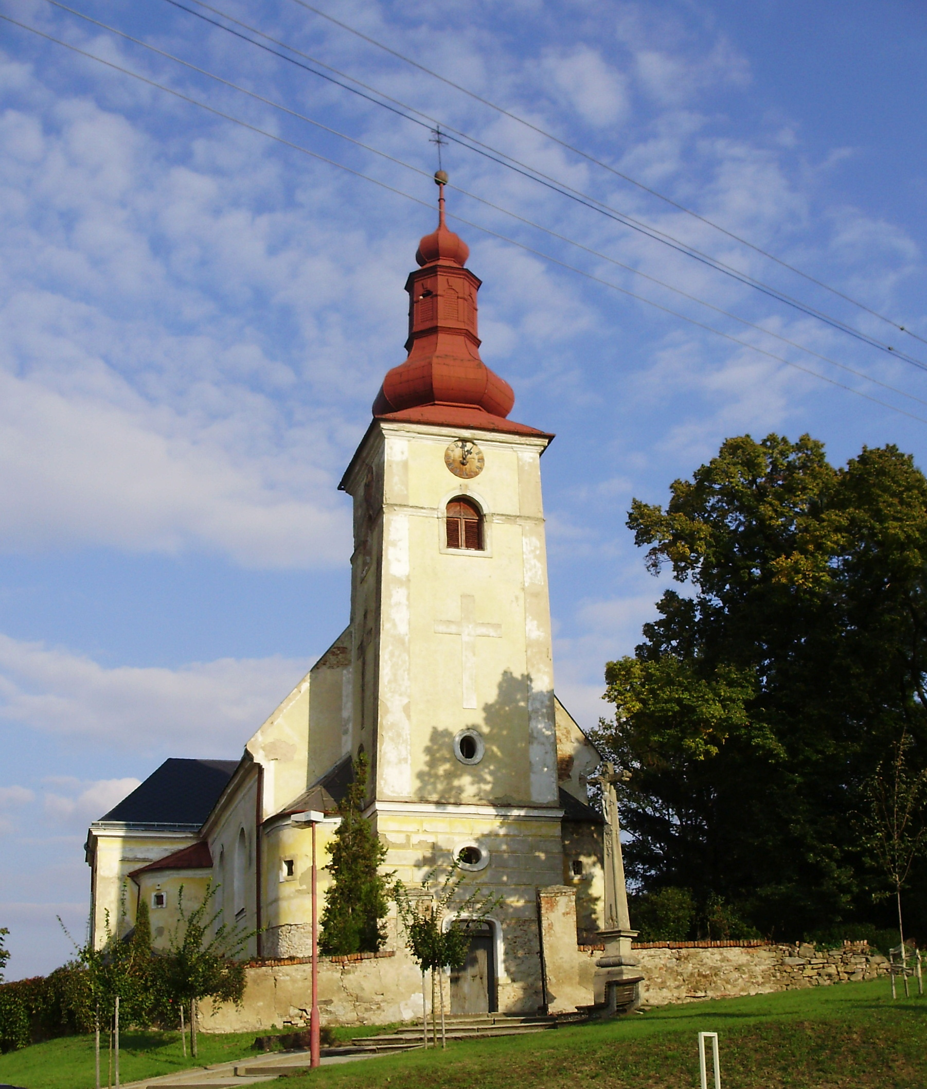 Kostel sv. Petra a Pavla, Kučerov (Vyškov District - Czech Republic)